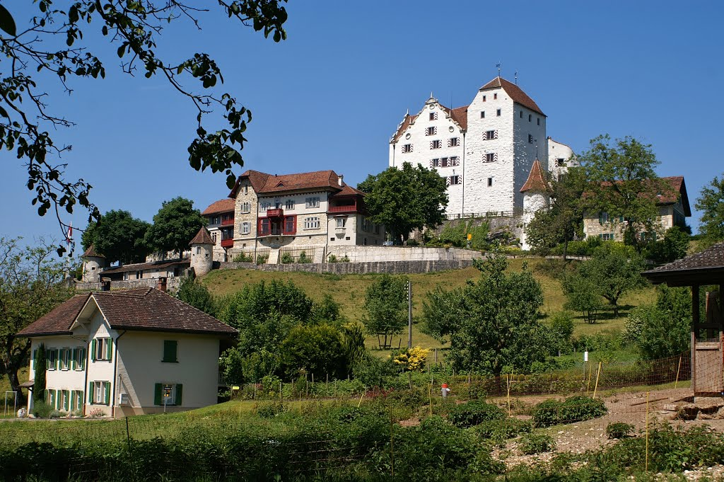 Schloss Wildegg te Wildegg.